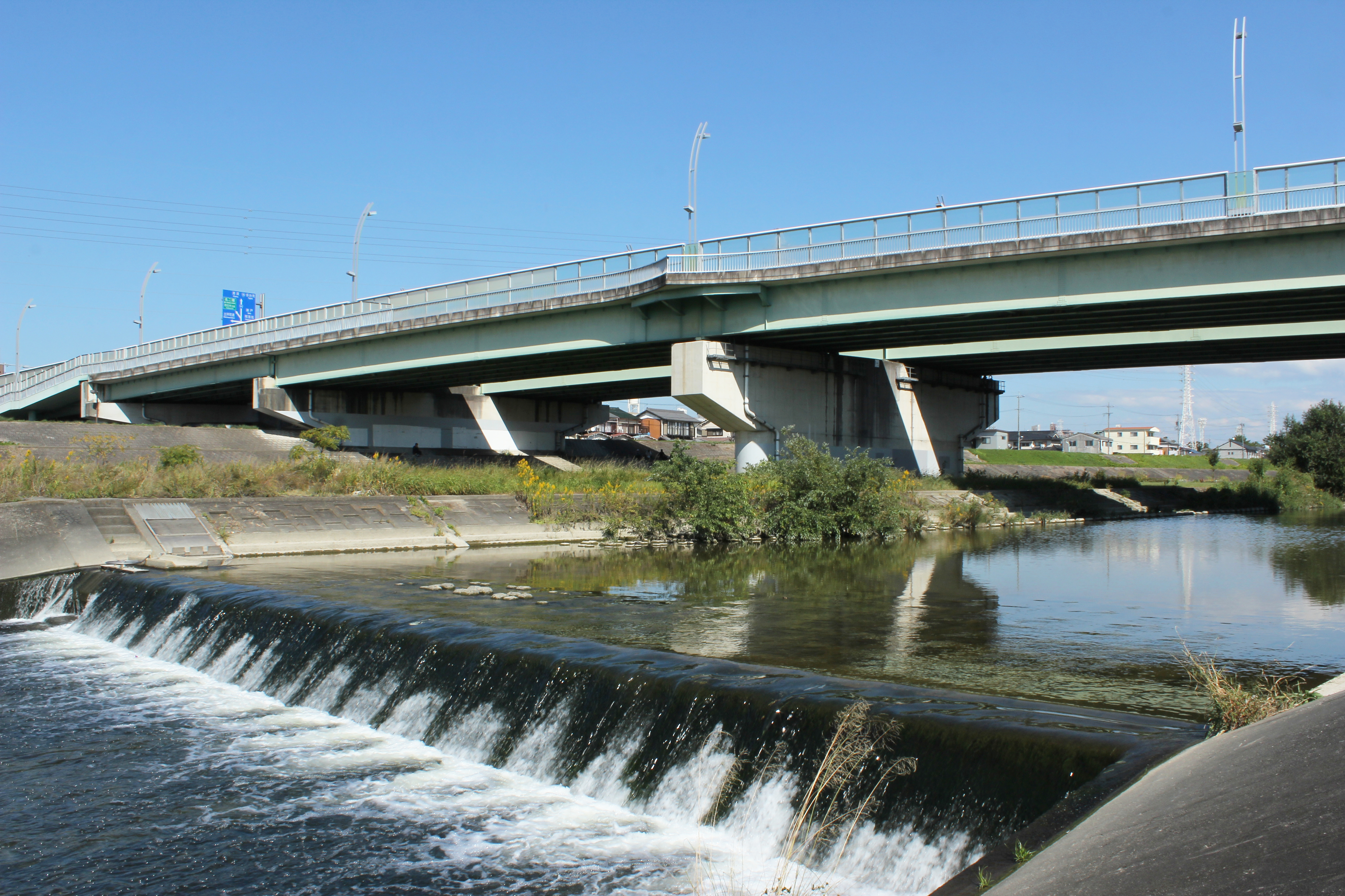 国道302号と矢田川（名古屋市守山区）